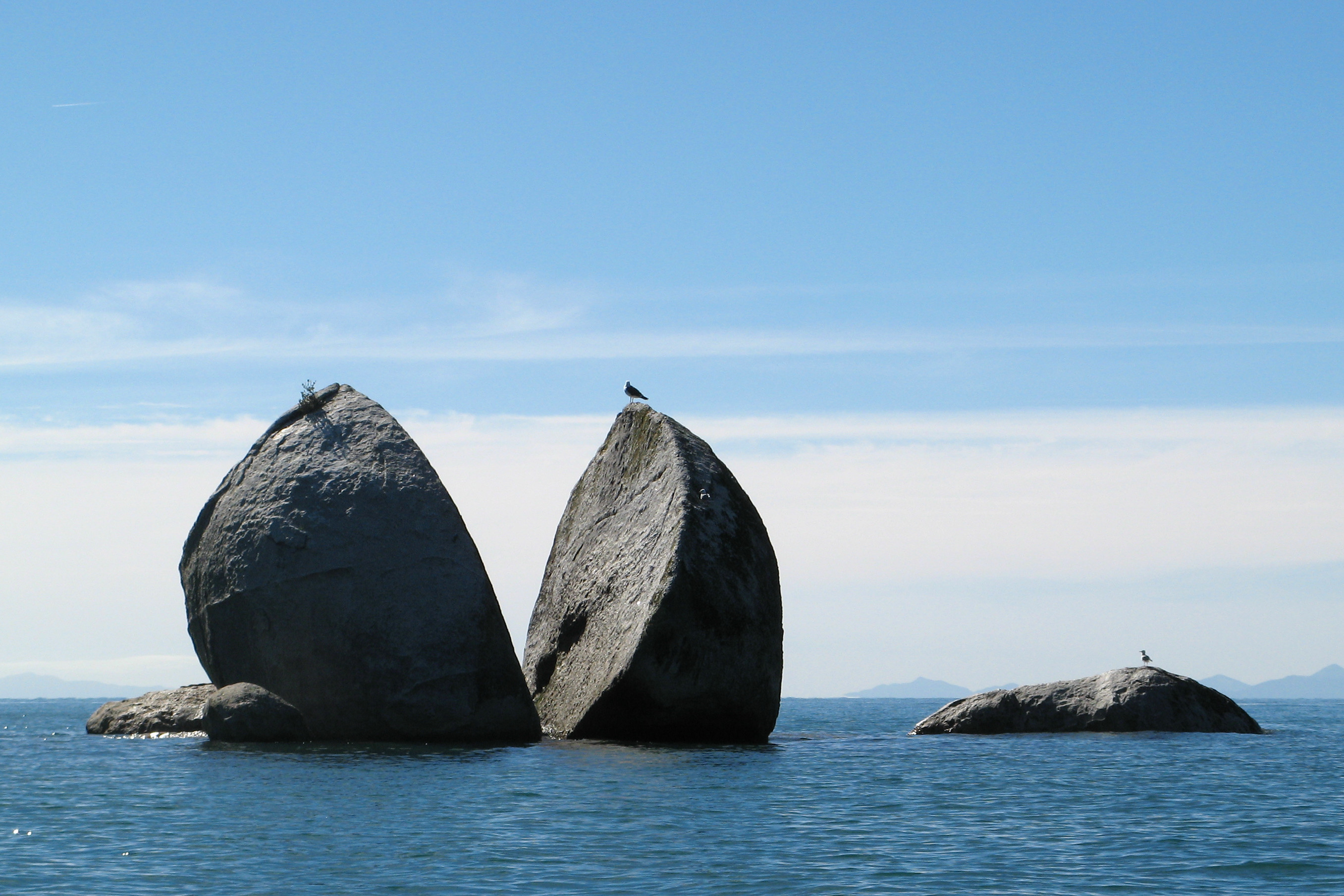 Kaiteriteri, New Zealand [2010]